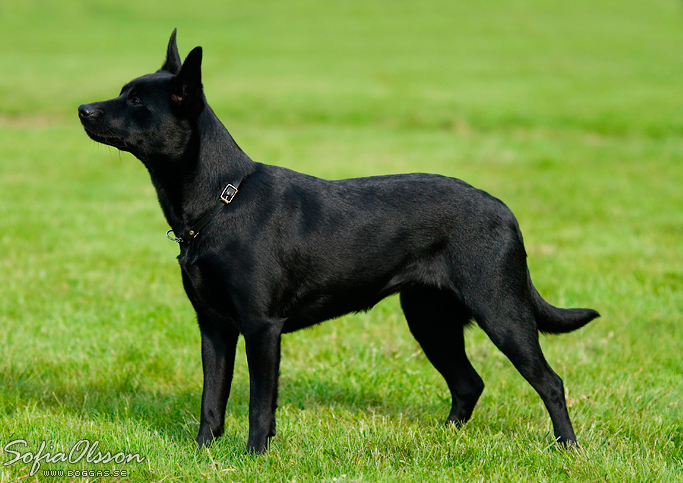 Svart kelpie